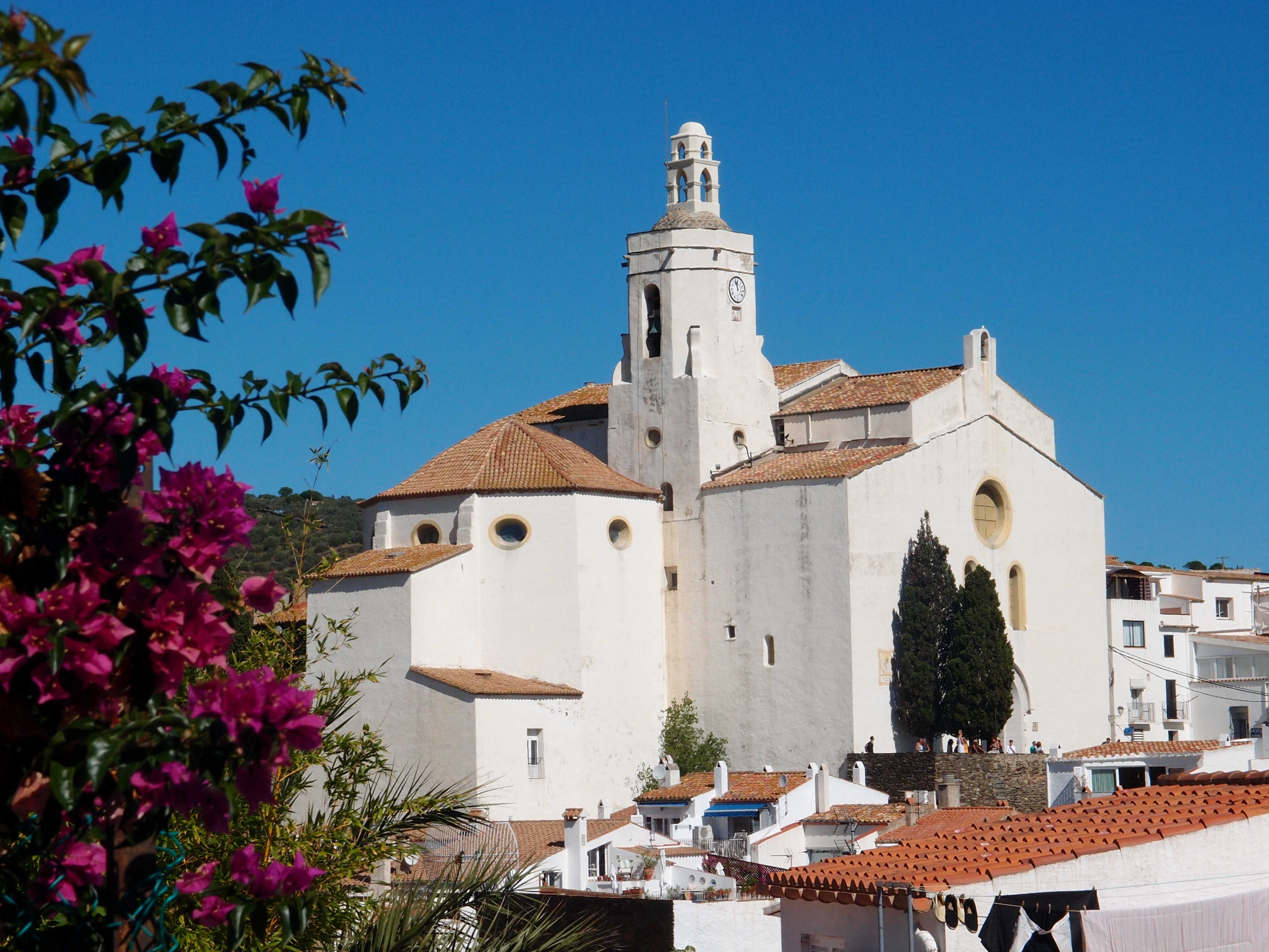 Kirche Santa Maria in Cadaqués (Spanien/Katalonien) Datum: 18.09.2013 Urheber: M. Pfeiffer alias Benutzer:Gordito1869 Quelle: privates Fotoarchiv des Urhebers